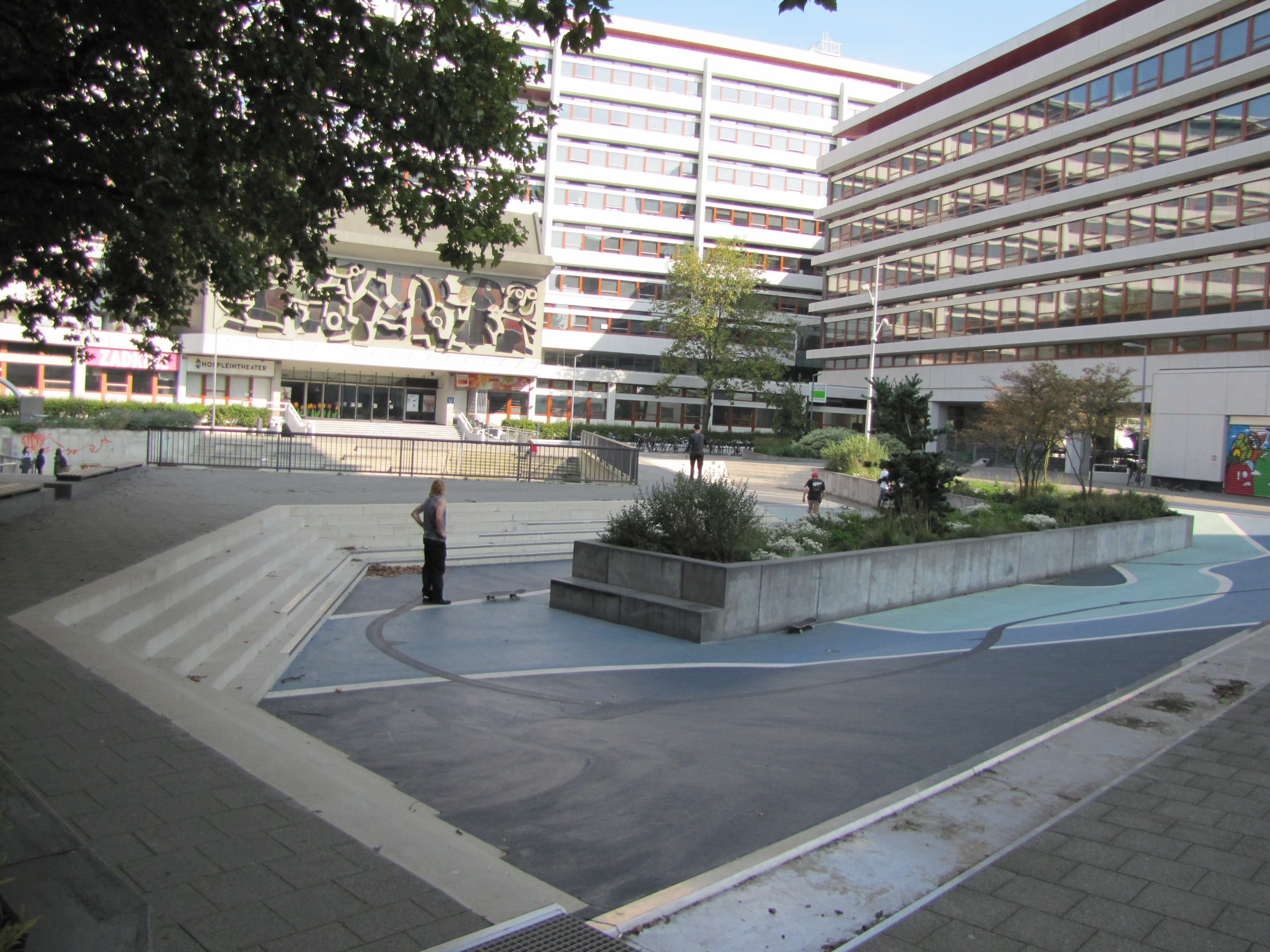 Place Benthemplein de Rotterdam. Terrain de jeu servant pour la gestion de l'eau de la ville : il se remplit en cas de risque d'inondation et l'eau est pompée dans la rivière pour être évacuée.